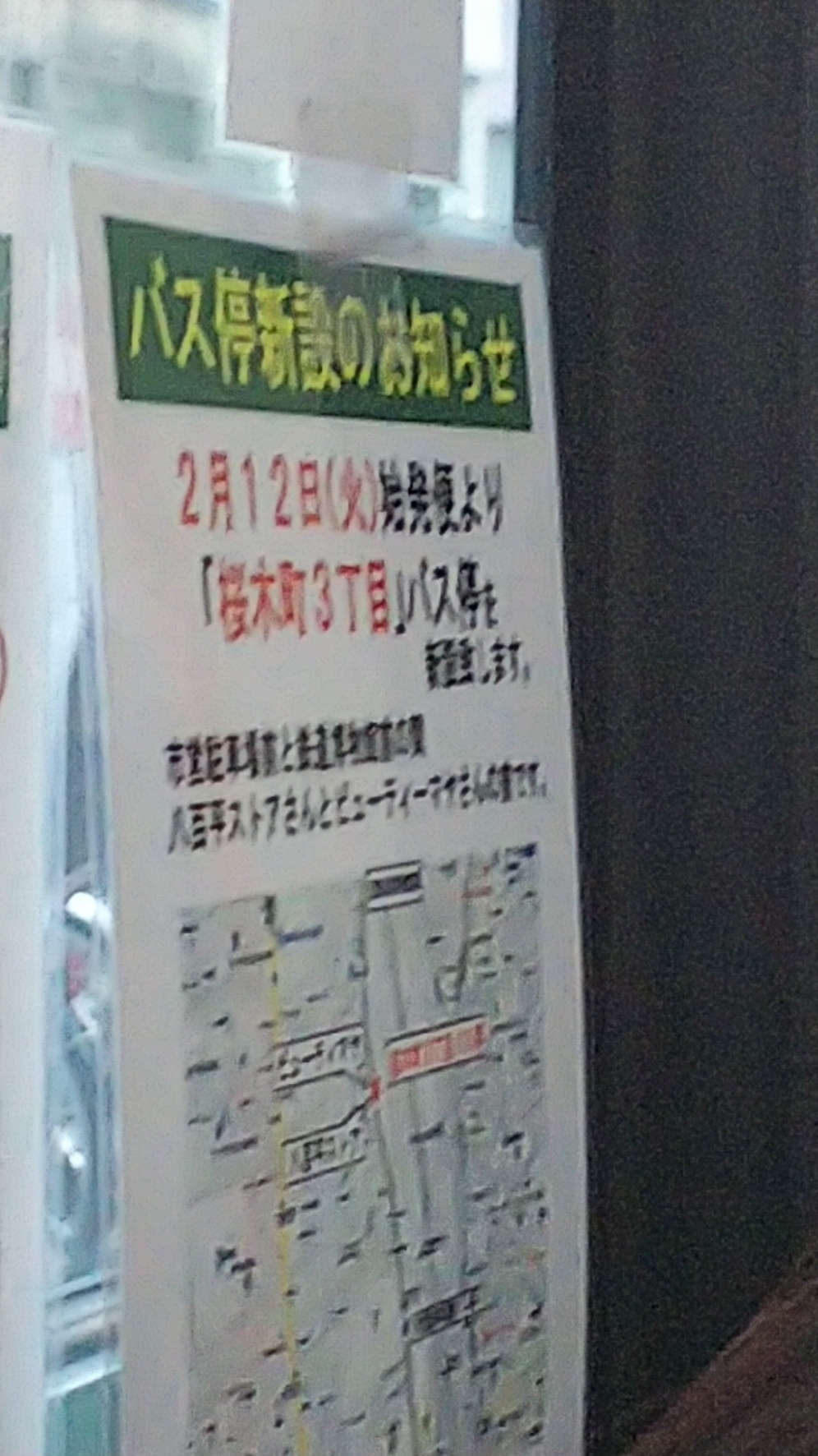 バス停新設のお知らせ。車内掲示。